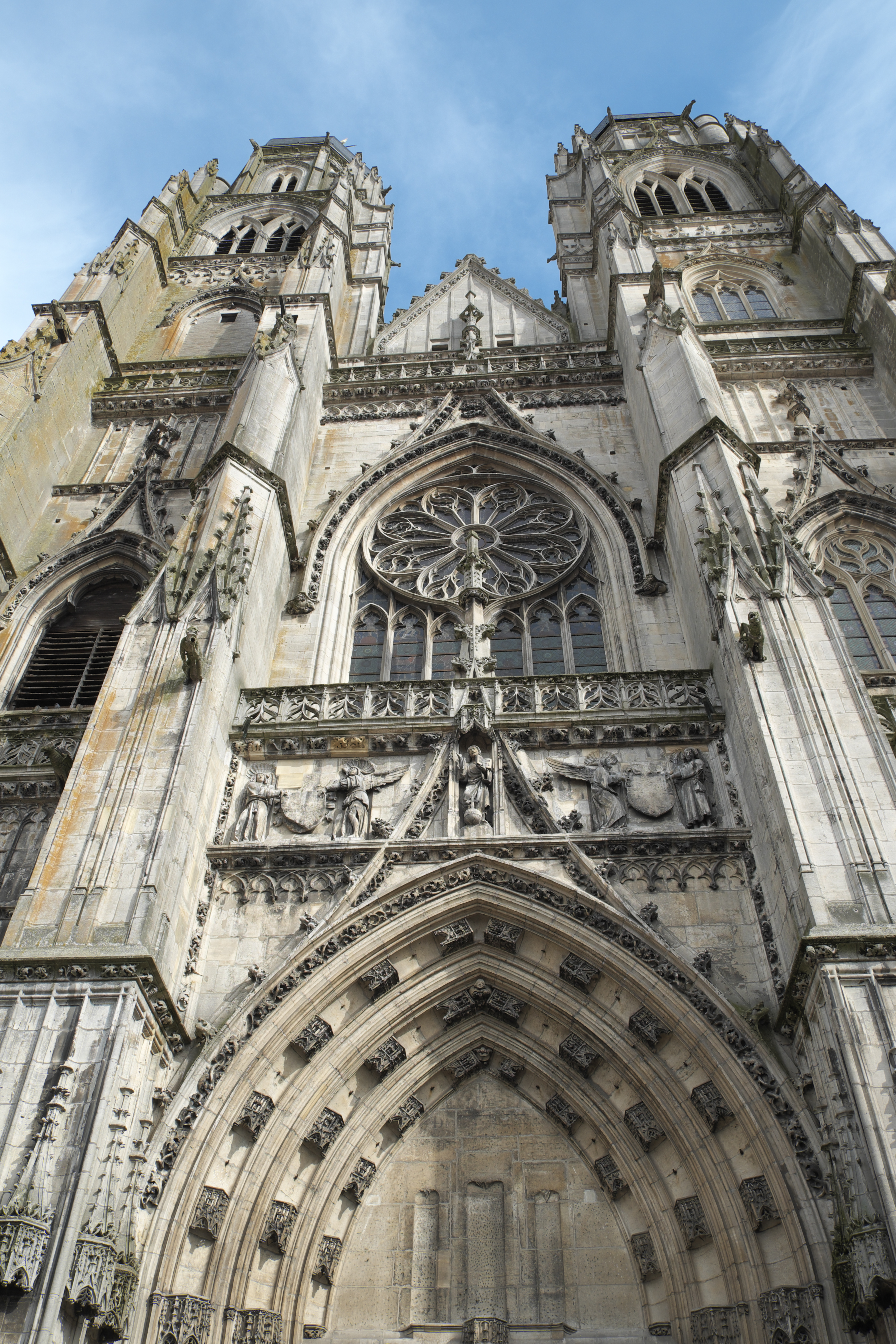 Basilika Saint-Nicolas in Saint-Nicolas-de-Port im Département Meurthe-et-Moselle (Lothringen/Frankreich), Westfassade